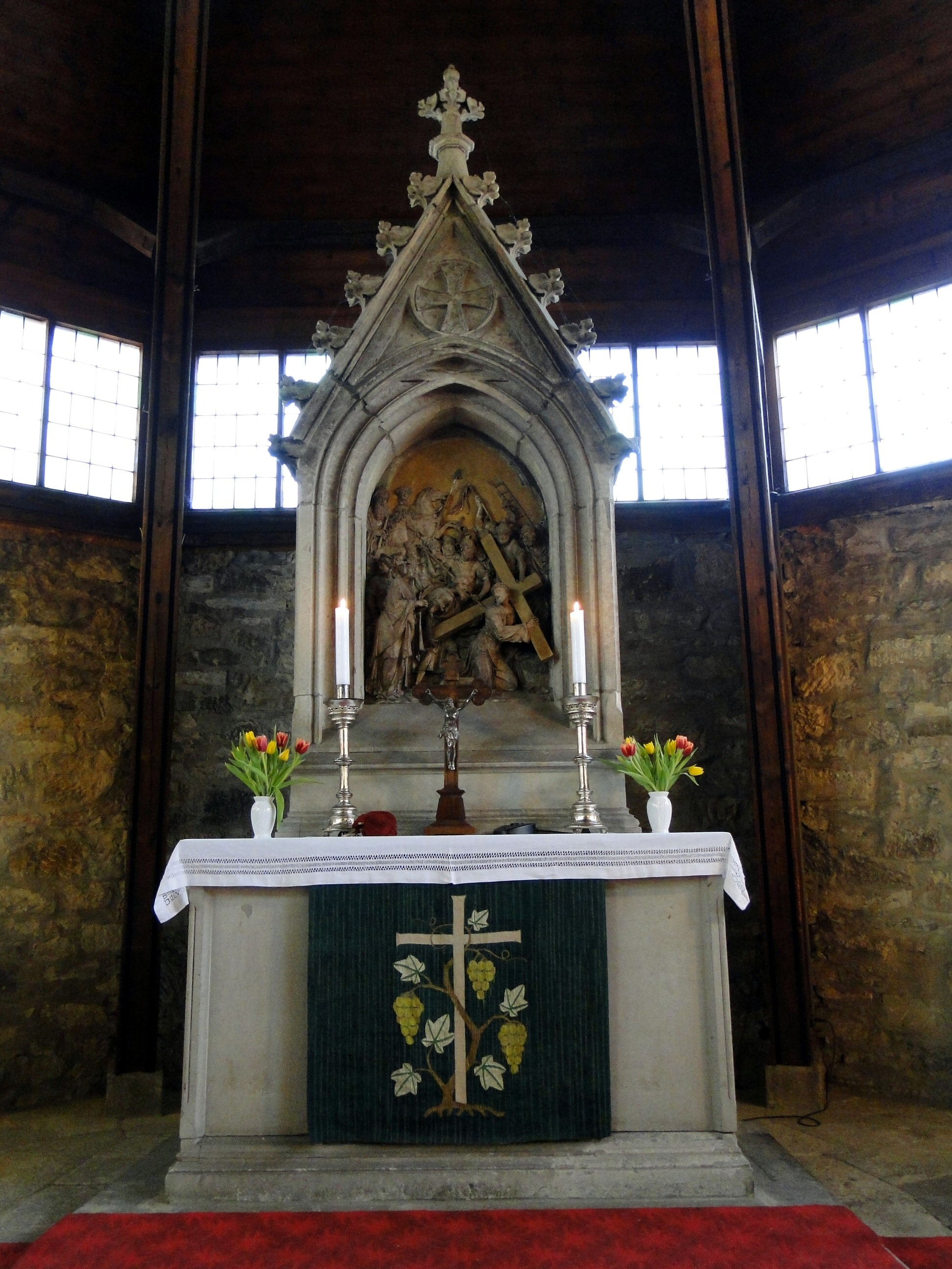 Altar der Friedenskirche Löbtau, früherer Sakristeialtar der Dresdner Sophienkirche